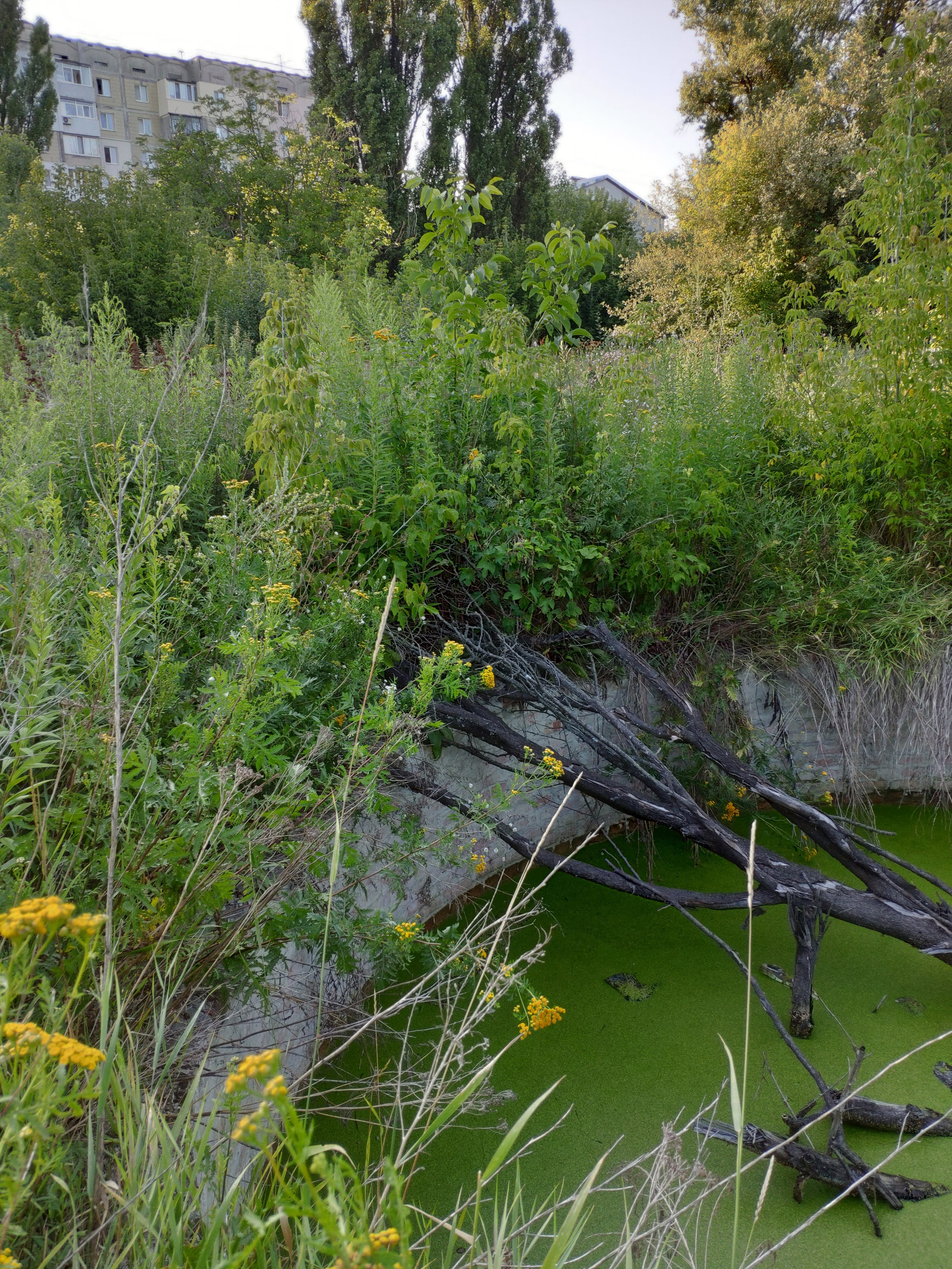 Відкрите сховище, артилерійські склади, Полтава